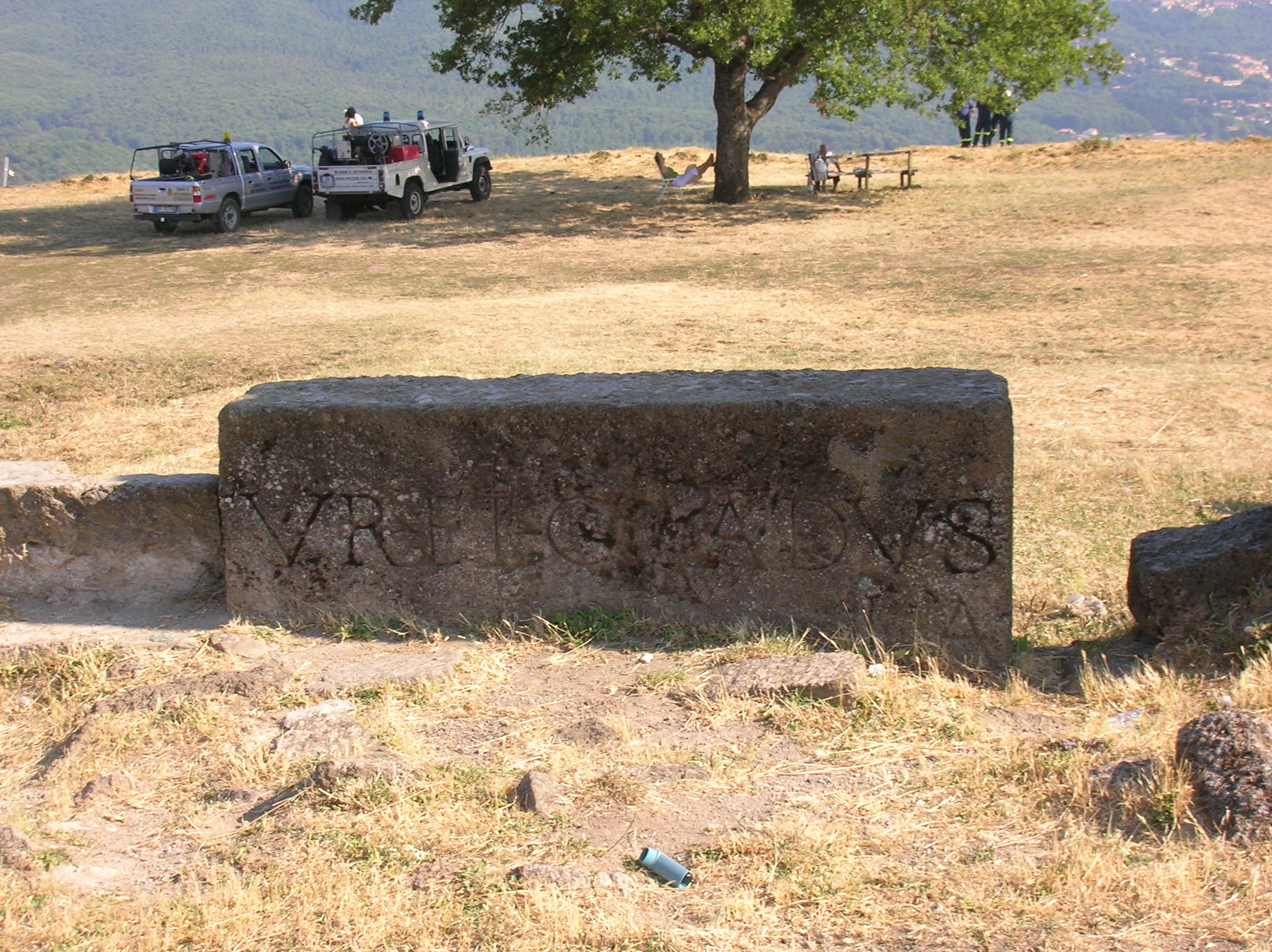 Iscrizione su rudere - Parco archeologico del Tusculum, Lazio, Italia.